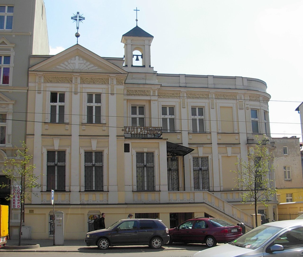 Bydgoszcz, ul. Gdańska 56 - kaplica pw. Bożego Ciała (kaplica sióstr Klarysek)